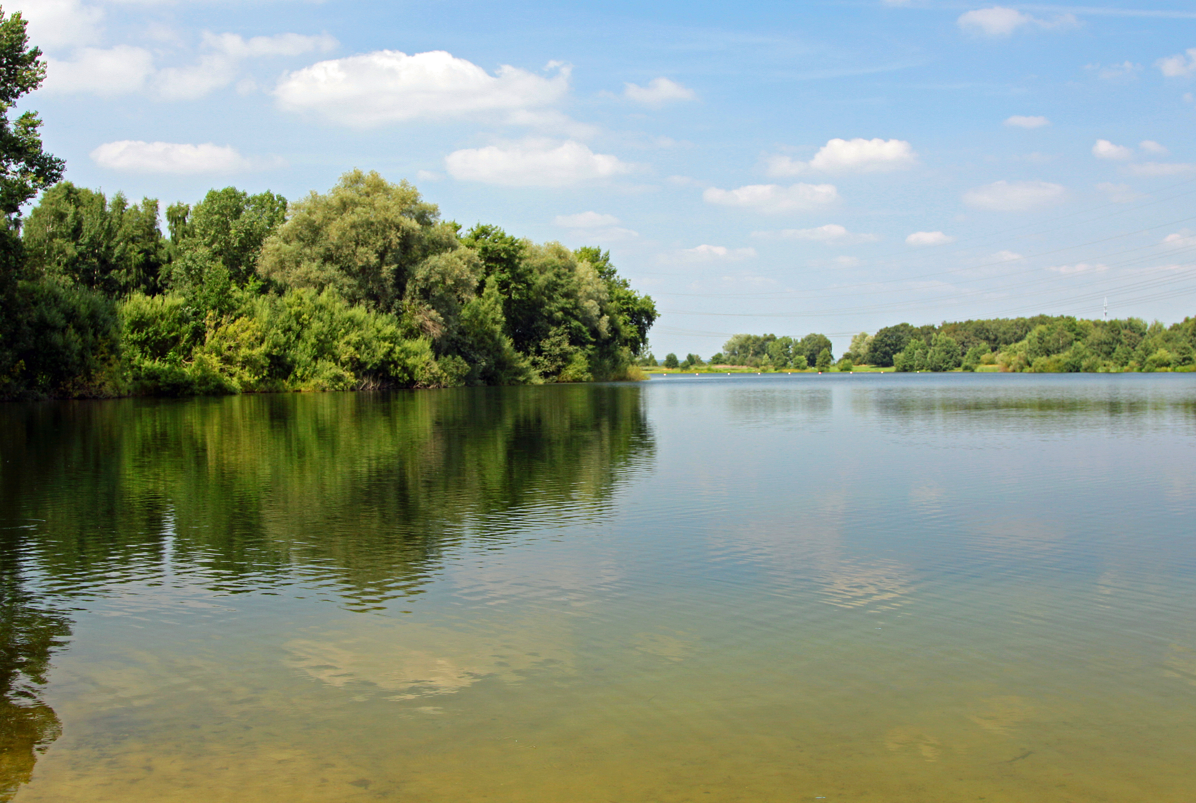 Fotografiert am 21.08.2013 mit einer Canon Eos 50d